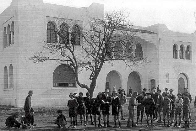 Le Lycée Gouraut ancêtre du Lycée Descartes.